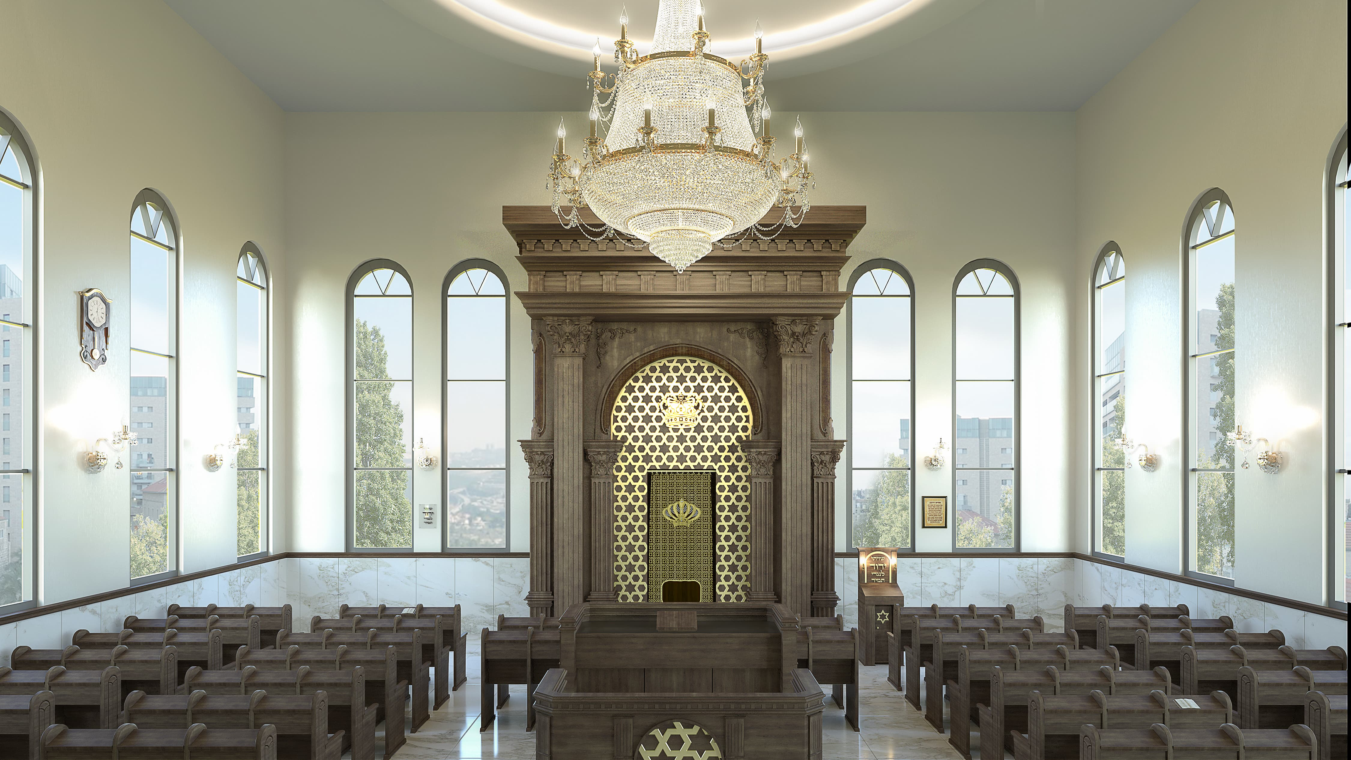 הדמית פנים בית כנסת